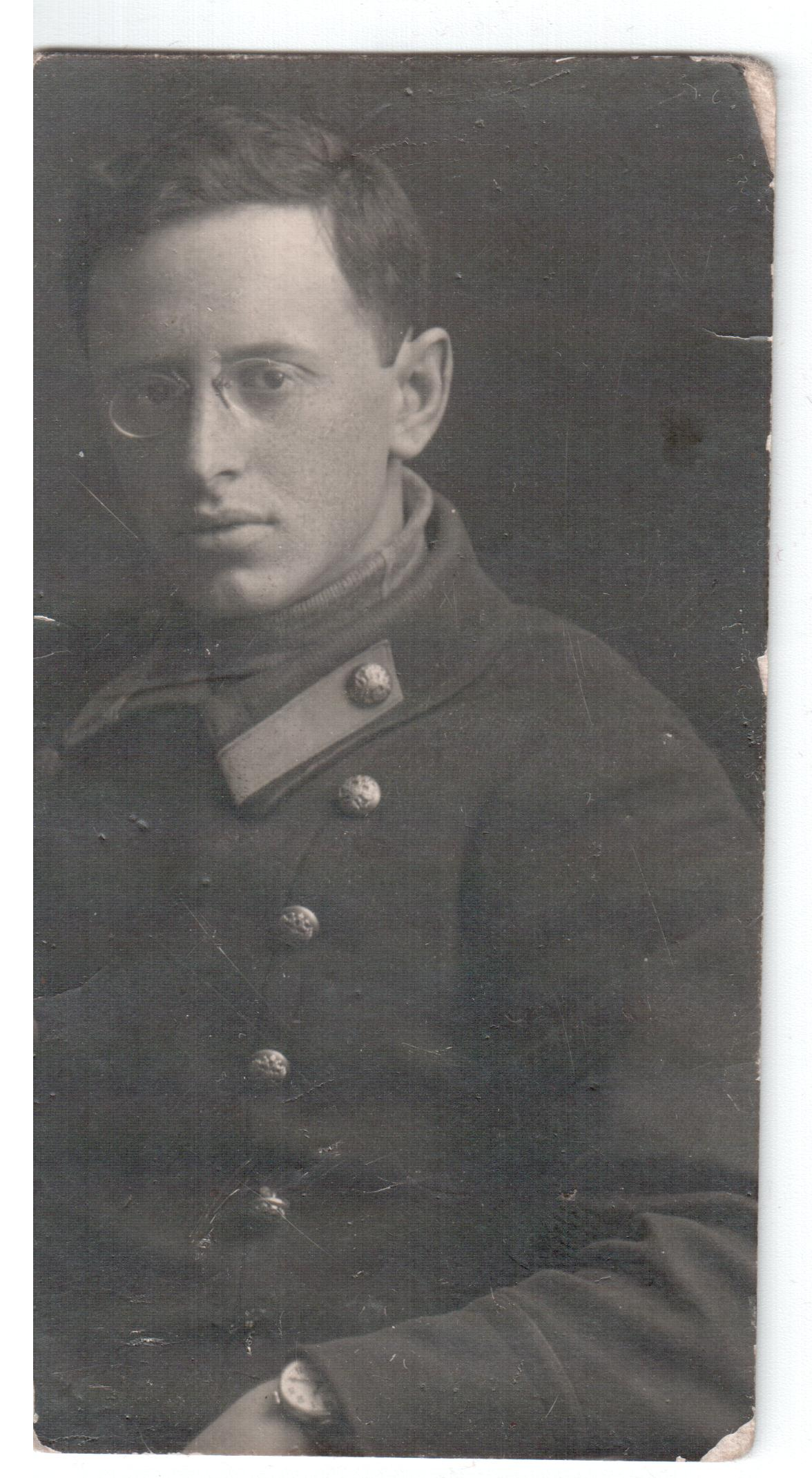 Абрам Самсонович Гринфельд (1895-1941), врач-рентгенолог. В шинели с пуговицами с двуглавым орлом: с. 12: «Студентам предоставляется право носить и шинели из темносерого сукна офицерского образца», Правила 1897 года (студент медицинского факультета Харьковского Императорского университета). Казнён немецкими оккупантами в 1941 году в Харькове (ноябрь?).